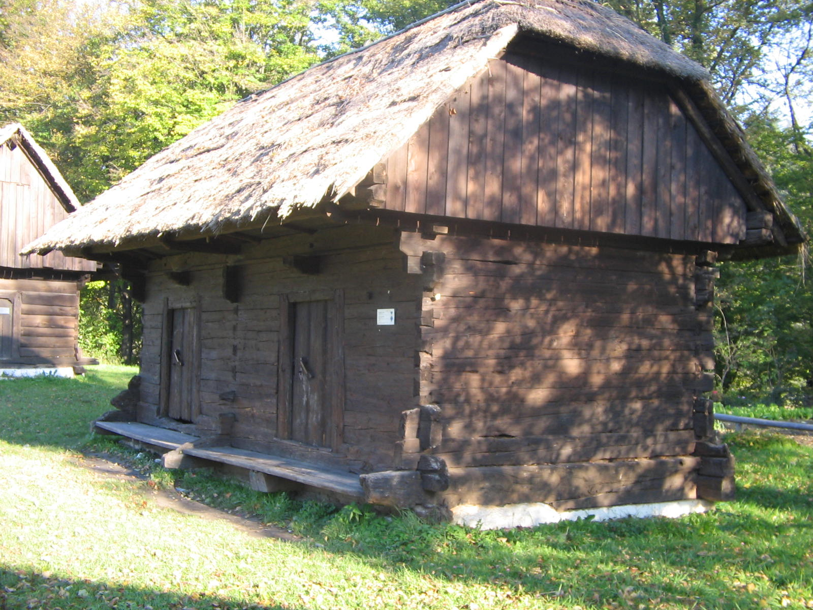 Open air museum Zaprice, granary, 1928 Quelle: eigene Aufnahme 18. 10. 2005 Fotograf: Janez Novak, Ljubljana, Slovenija